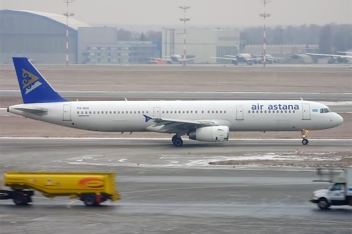 Air Astana, P4-NAS, Airbus A321-131